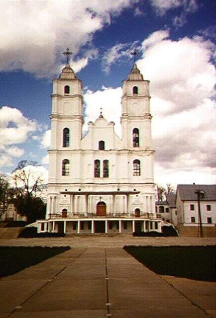 tagen av uppladdaren